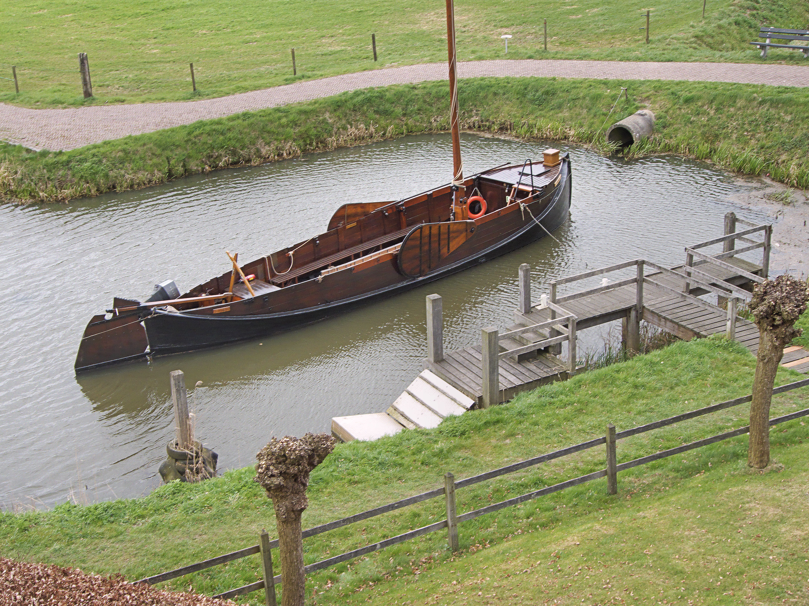 Zomp in de Regge bij Pelmolen Ter Horst, Rijssen